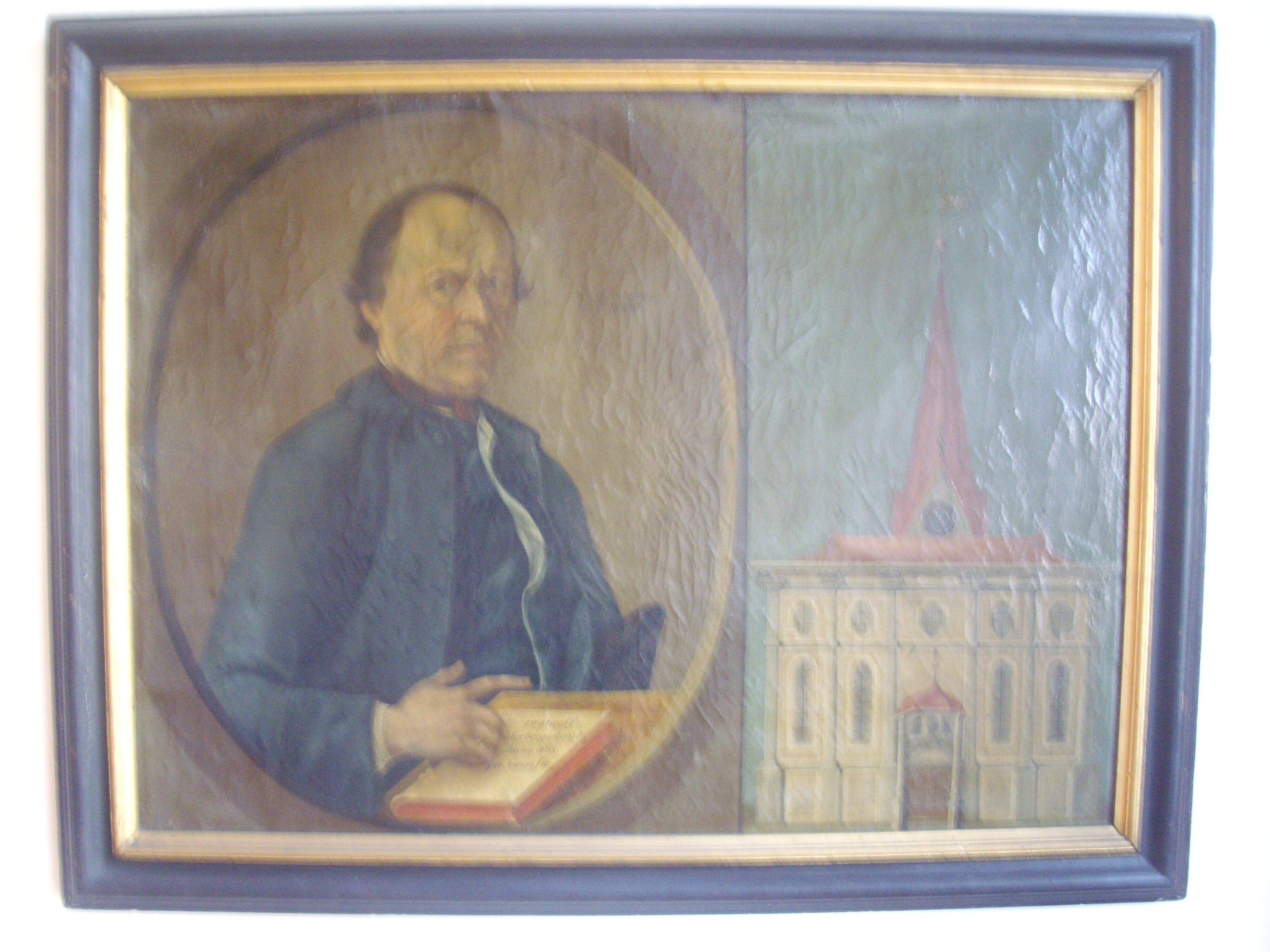 Links der Untervogt Hans Caspar Blattmann (1716-1786), rechts die 1767 geweihte reformierte Kirche Wädenswil, Öl auf Leinwand, 111.5 x 85 cm, Künstler unbekannt, um 1768